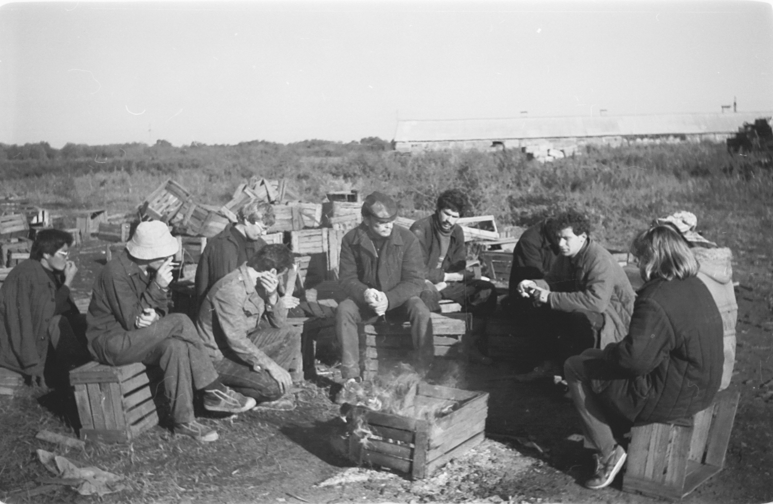 Студенческие строительные отряды